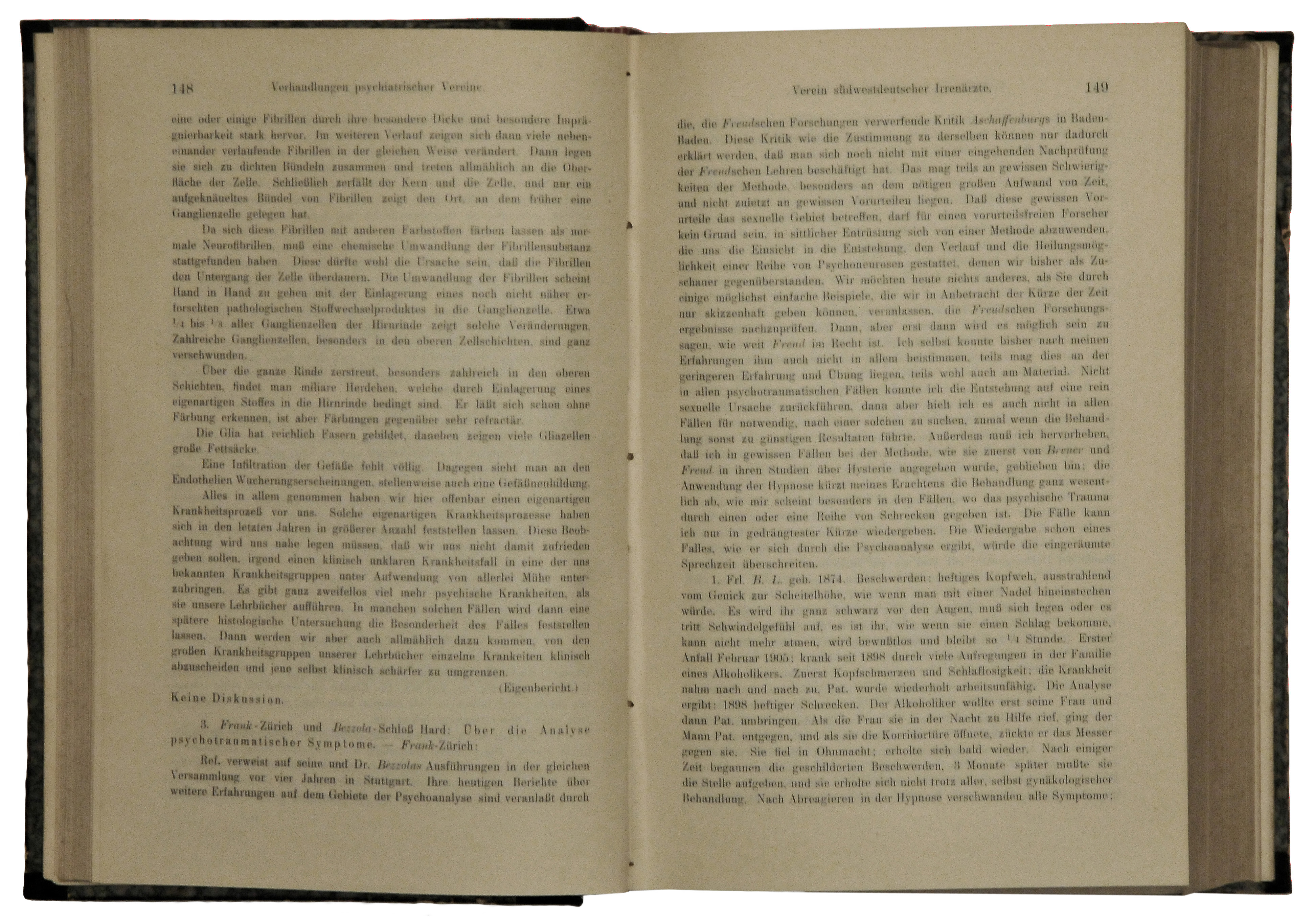 Fortsetzung Alzheimer, Alois: Über eine eigenartige Erkrankung der Hirnrinde. Vortrag in der Versammlung Südwestdeutscher Irrenärzte in Tübingen am 3. November 1906. Referiert (Eigenbericht) in: Allgemeine Zeitschrift für Psychiatrie und psychisch-gerichtliche Medizin 64. Bd. (1907) S. 146 -148. [Beschreibung der Alzheimerschen Erkrankung im Erstdruck.]